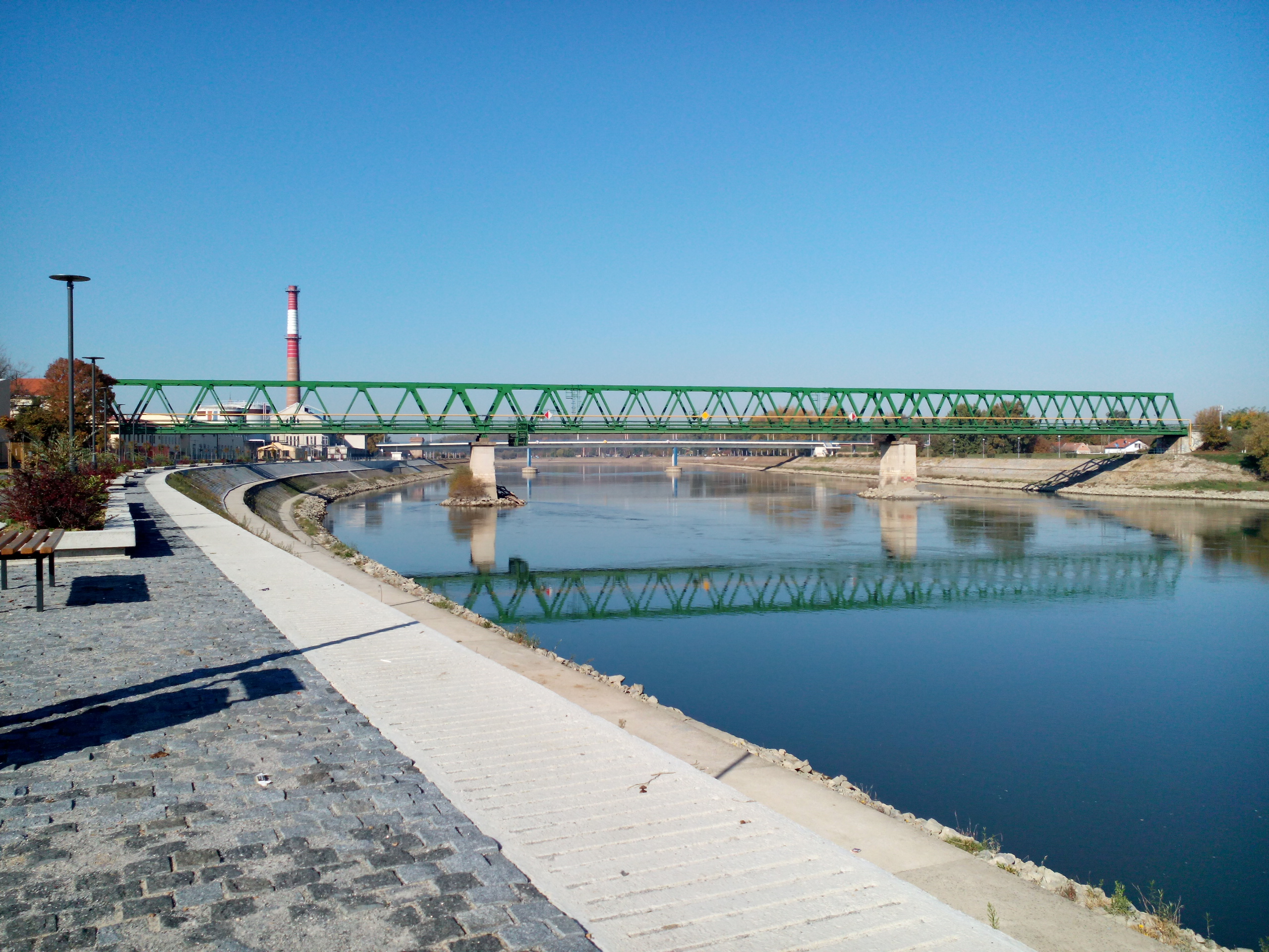 Željeznički most u Osijeku, u drugom planu most dr. Franje Tuđmana.